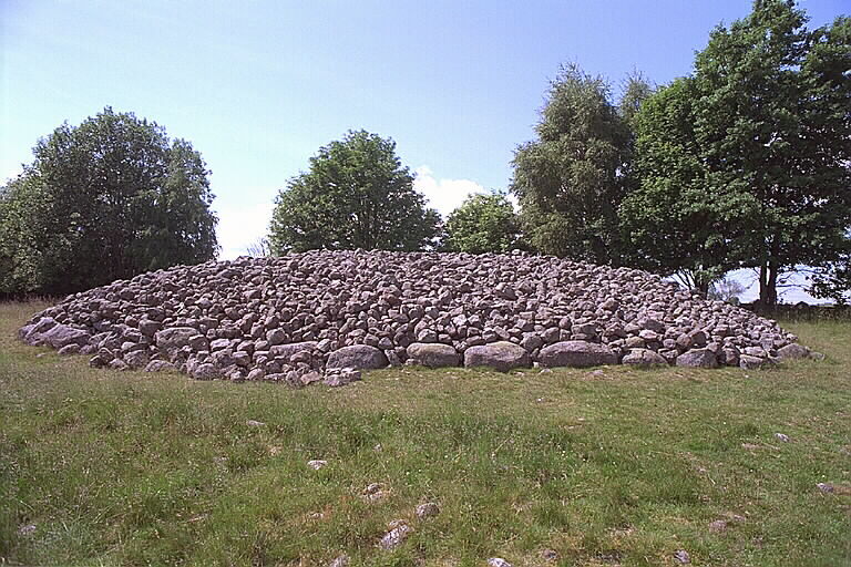 Röse. Motiv: Ekornavallen Nyckelord: Raä-Fastigheter, Riksintressen Kategori: Röse Röse.